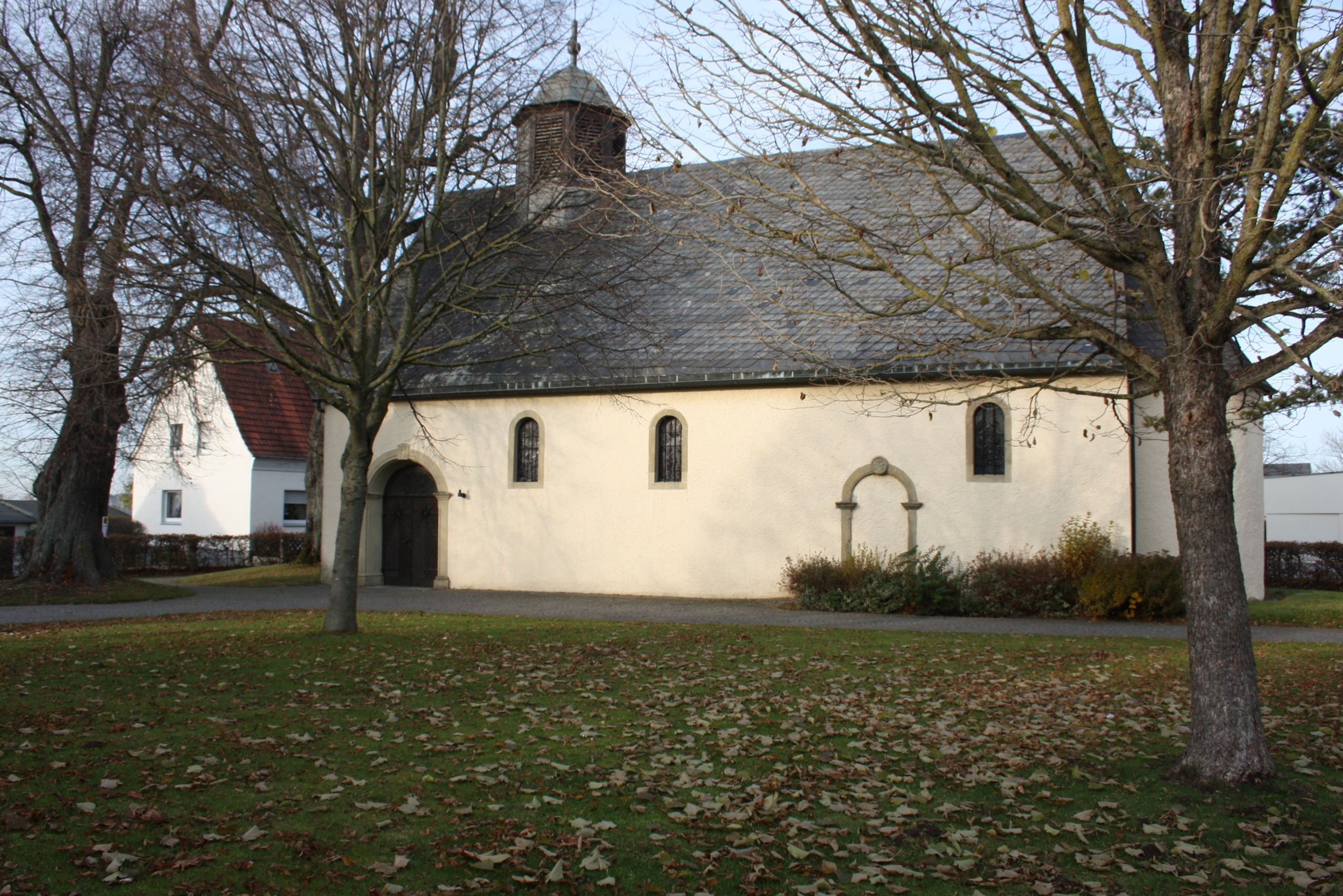 Brilon, Nehden, Kapelle St. Johannes, Eingangsansicht